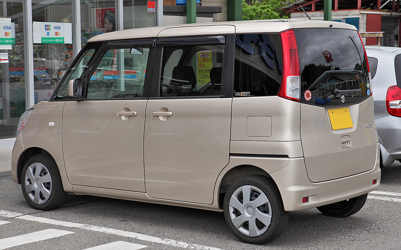 Suzuki Palette